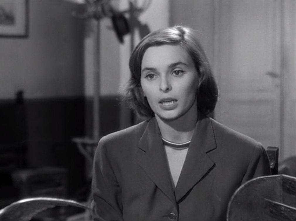 Screenshot dal film Accadde al commissariato (1954)